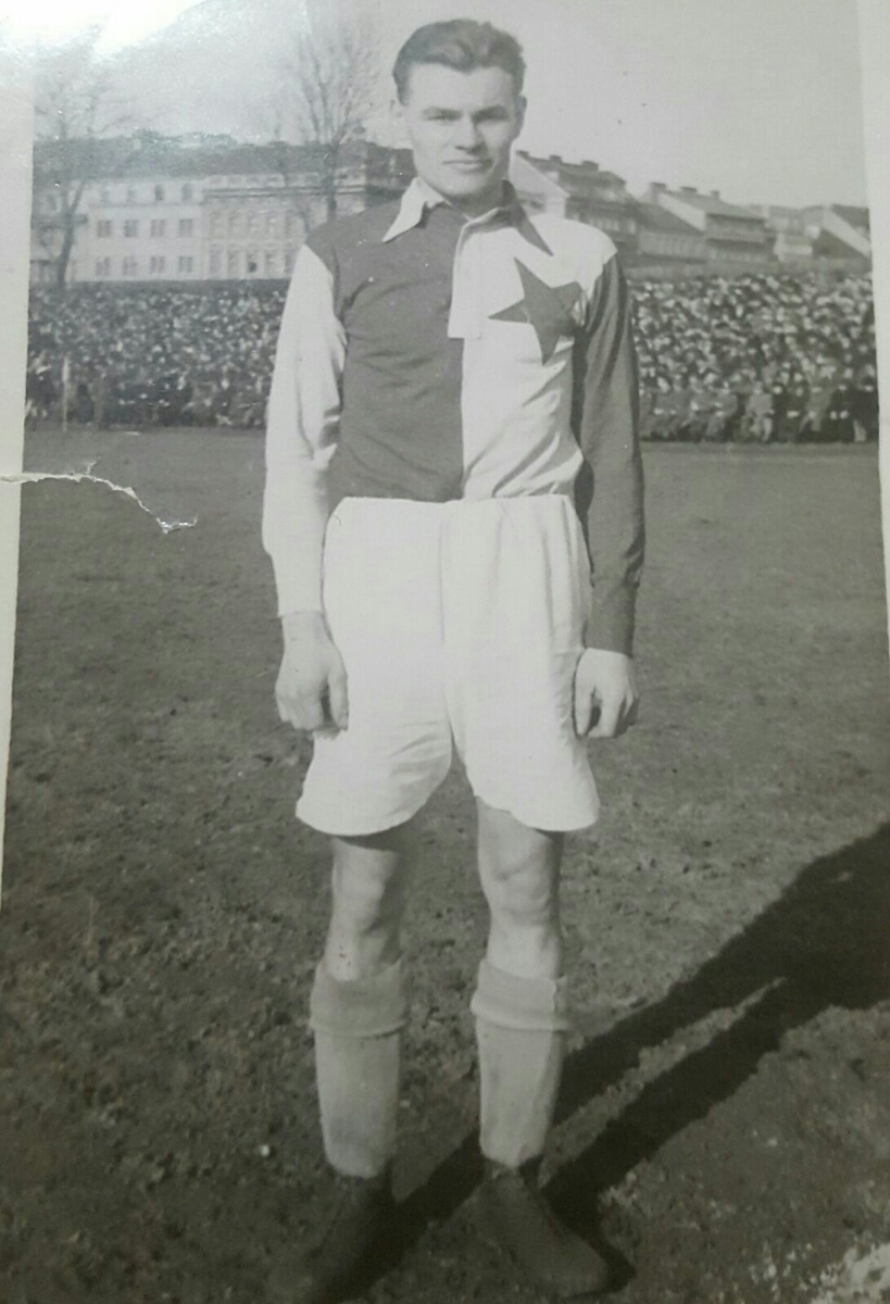 Fotbalista Miloslav Žižka (SK Slavia Praha 1943/44)